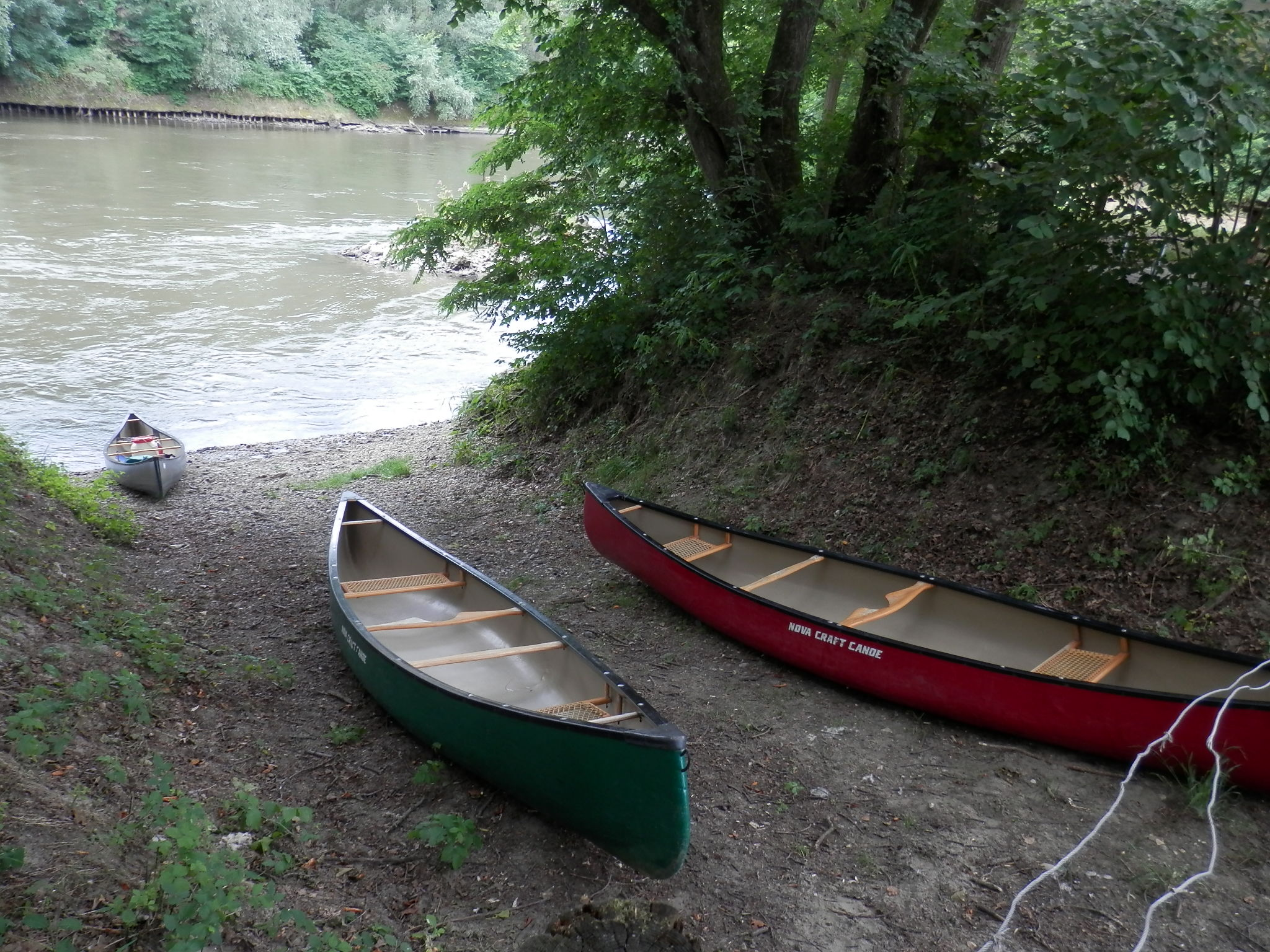 Kanadier-Boote nahe der Rollfähre in Weitersfeld vorbereitet für eine Fahrt auf der Mur nach Bad Radkersburg